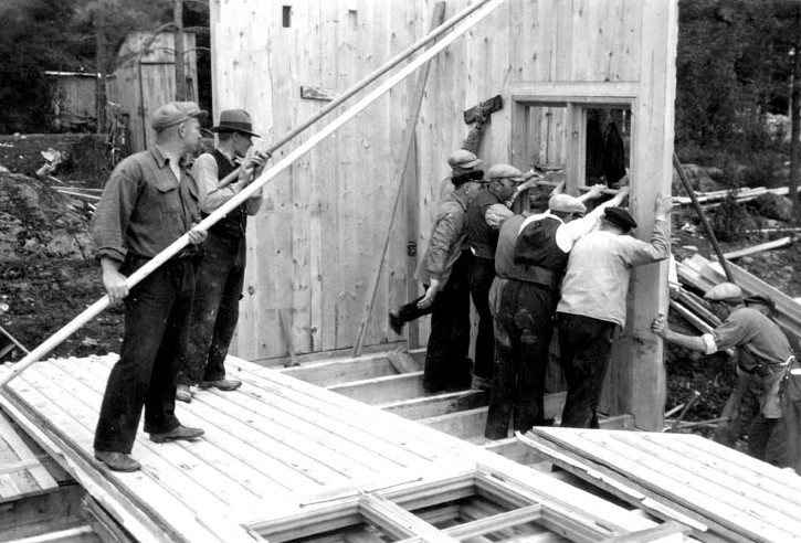 Resning av väggblock till hus i Svedmyras småstugeområde